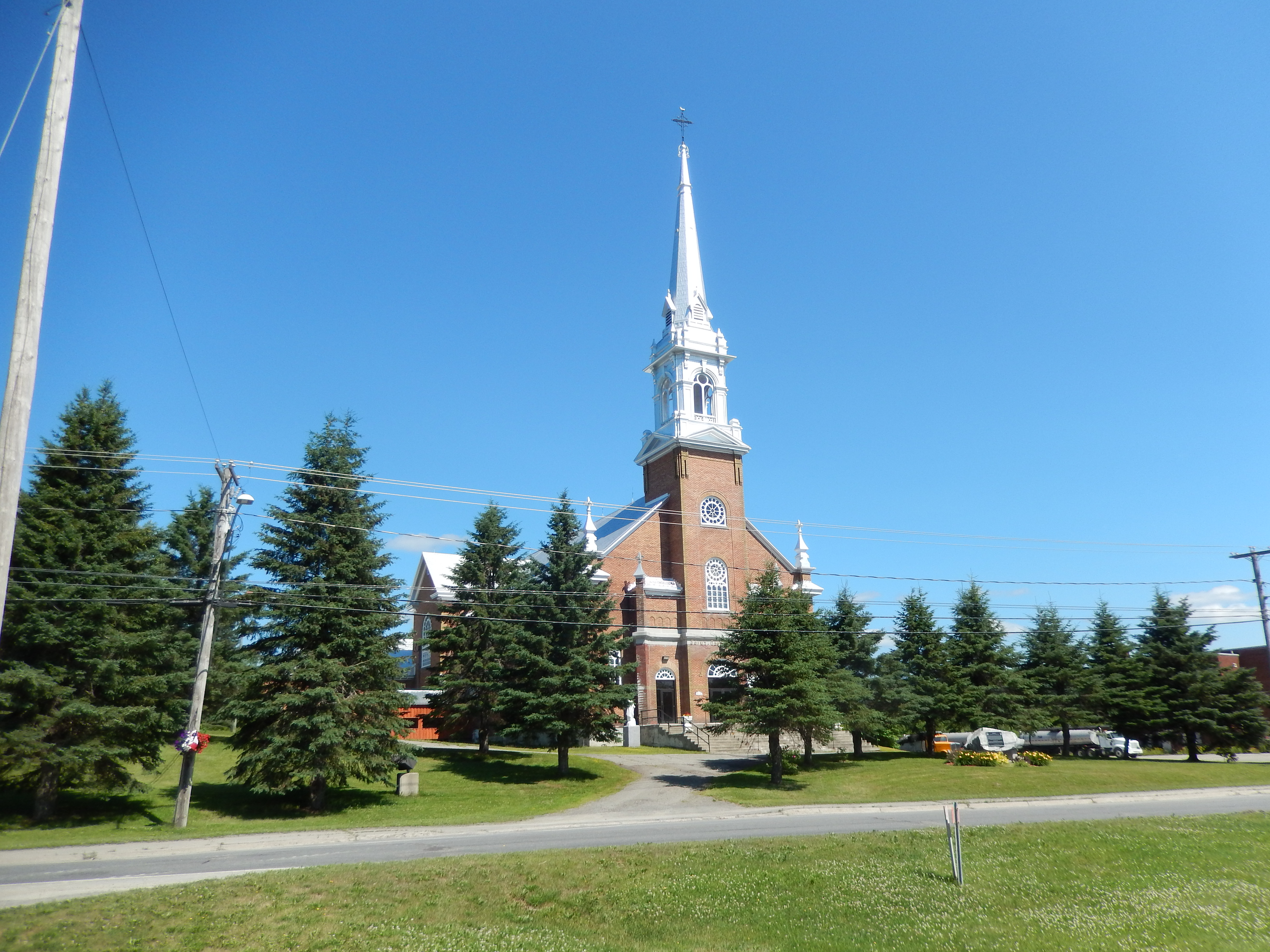 Église Saint-Cœur-de-Marie, 3771, rue Principale, Baker-Brook (Canada). (Protection LHL. Voir la liste des lieux patrimoniaux du comté de Madawaska pour plus de détails).